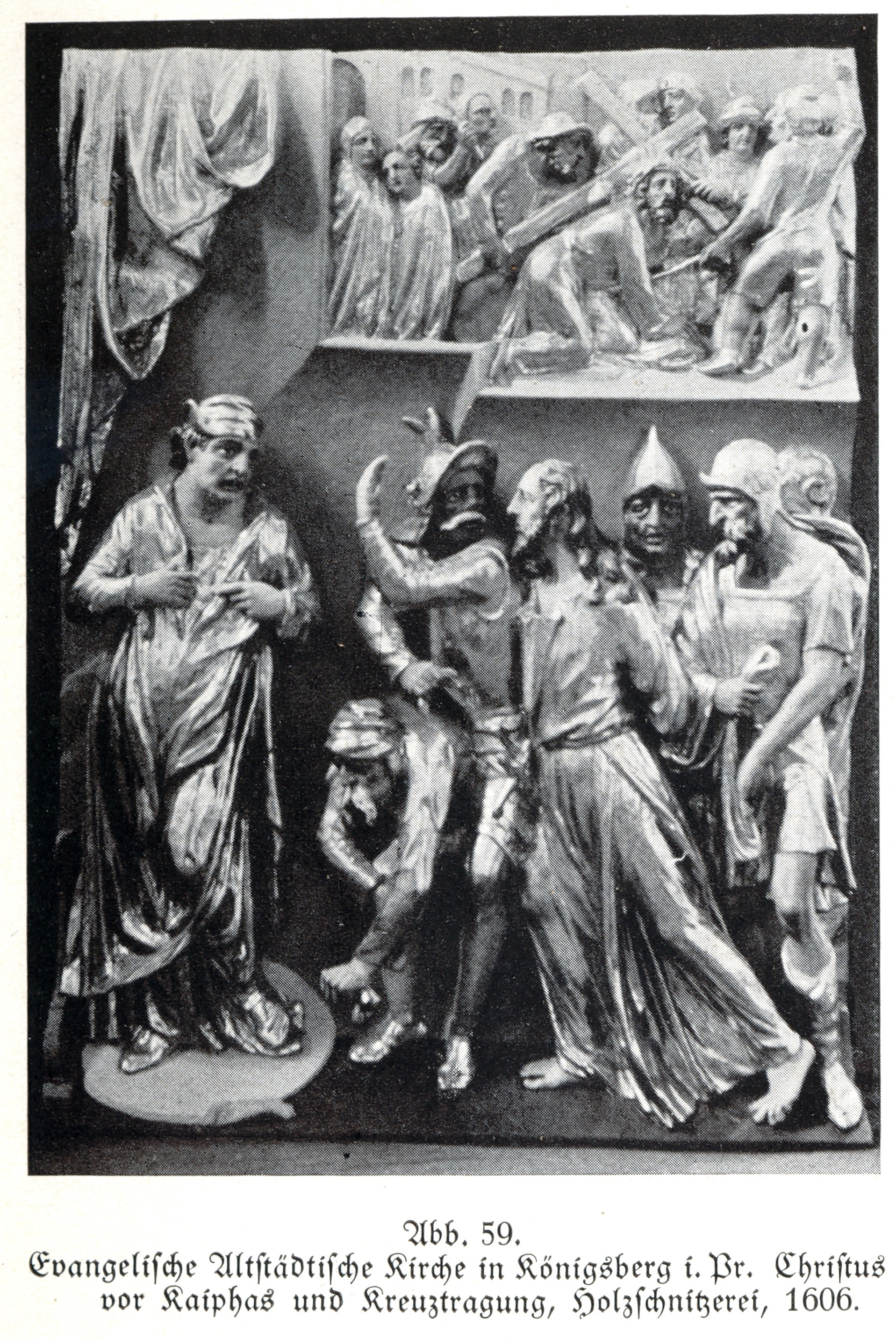 Königsberg, Evangelische Altstädtische Kirche, Christus vor Kaiphas und Kreuztragung, Holzschnitzerei, 1606